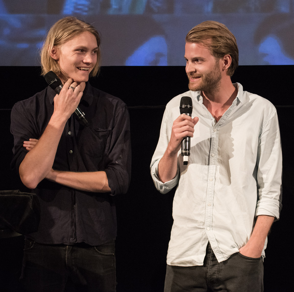 Filmen "Efterskalv" presenteras i Filmhuset i Stockholm den 17 augusti 2015. Från vänster: Ulrik Munther och Magnus von Horn.